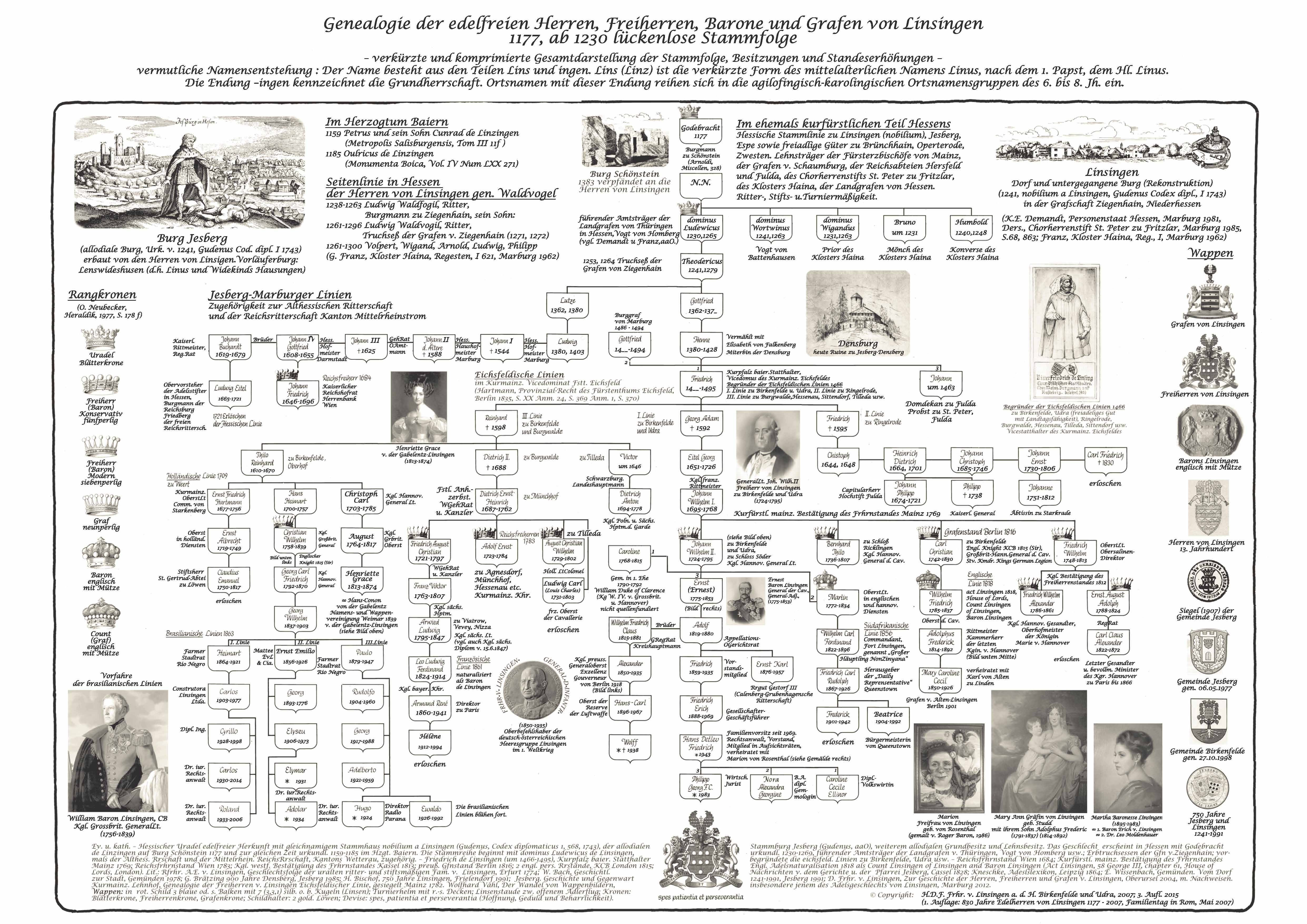 Verkürzte und komprimierte Gesamtdarstellung der Stammfolge, Besitzungen und Standeserhöhungen des Adelsgeschlechts von Linsingen (ab 1177)